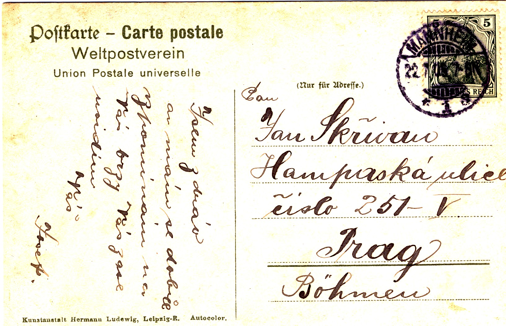 Weltpostkarte mit dem vorgeschriebenen Zudruck 'Carte postale'